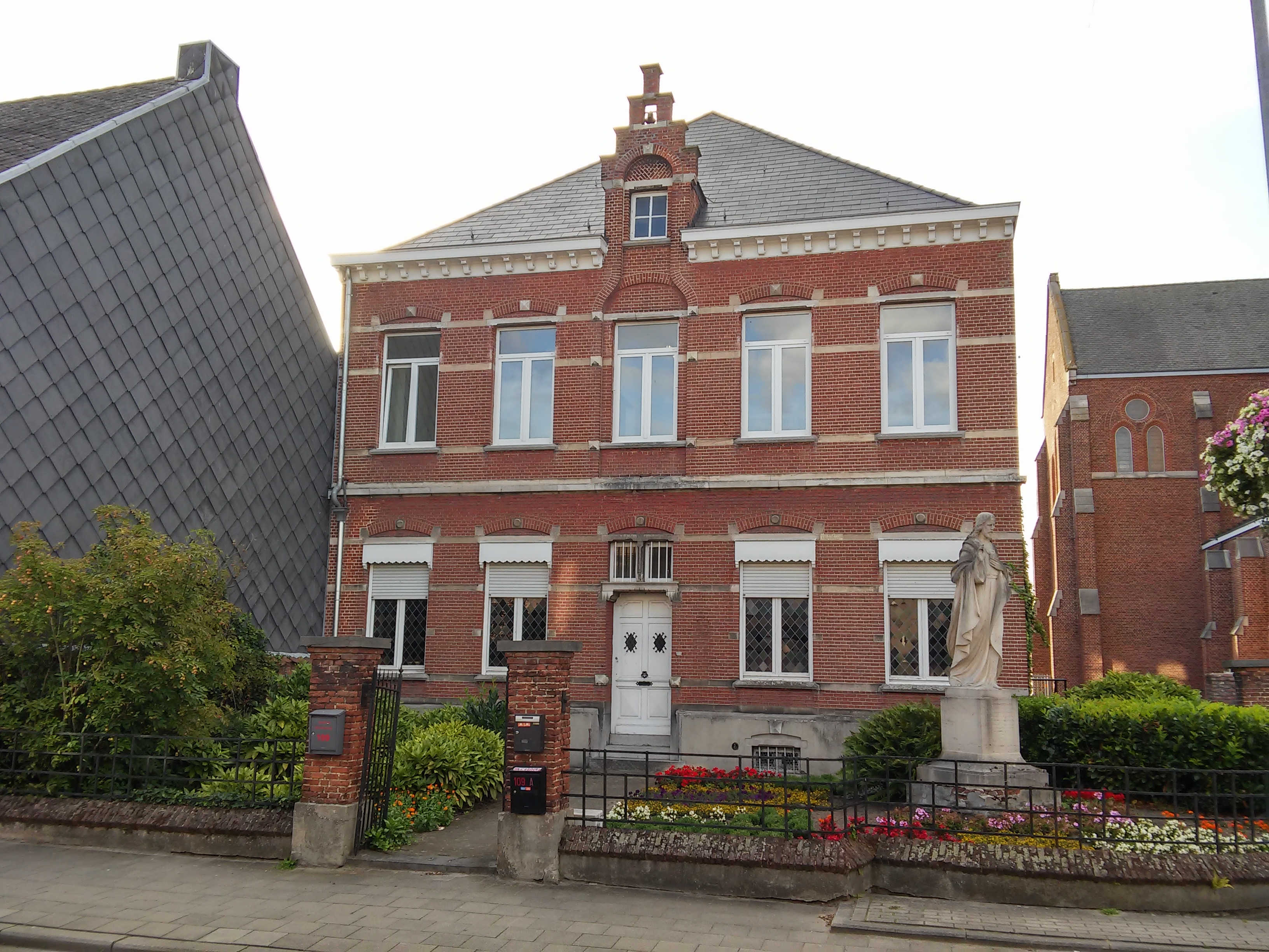 Pastorie, Clemenceaustraat 109